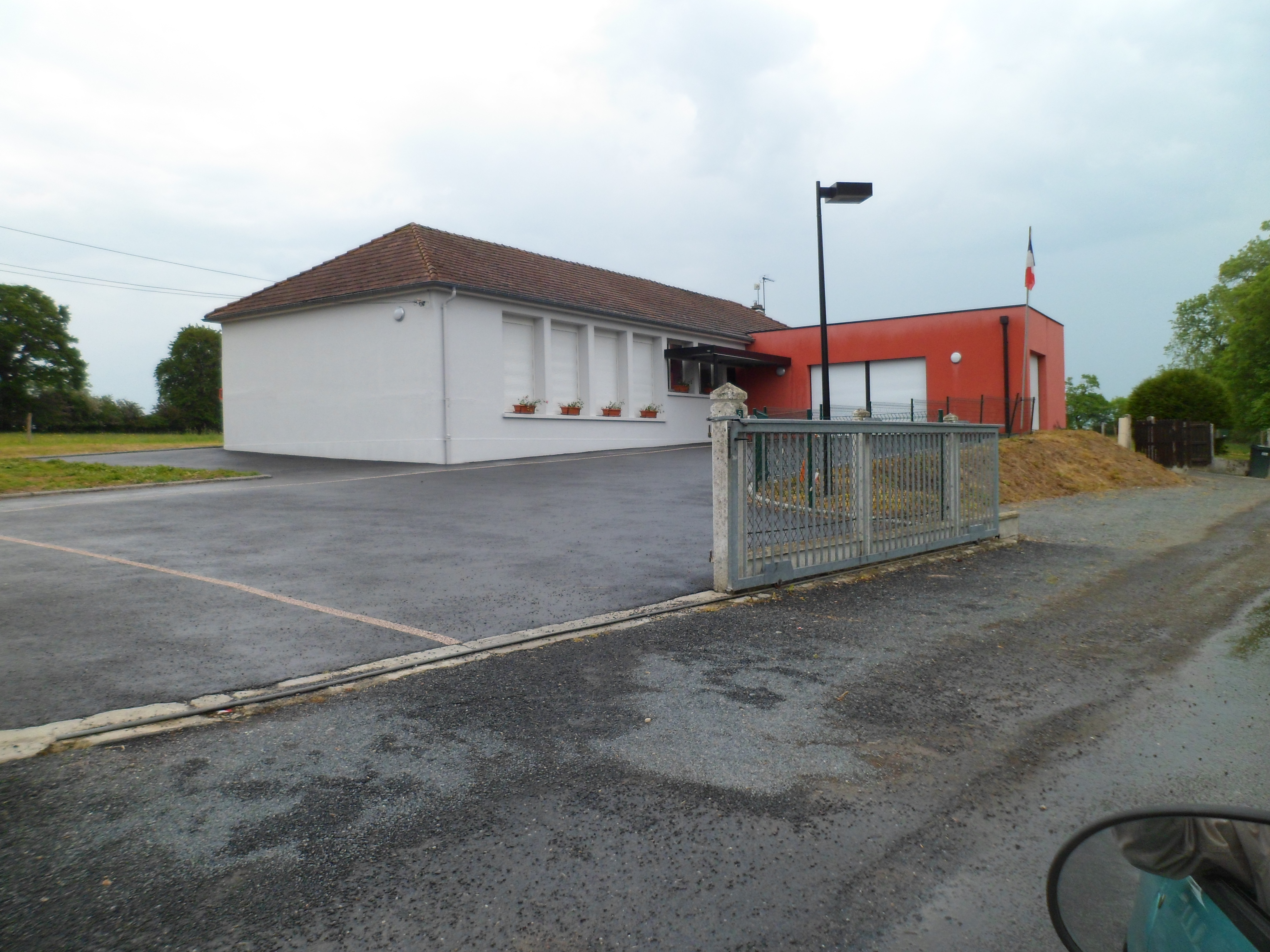 Église Saint-Jean de Lamberville (Manche)